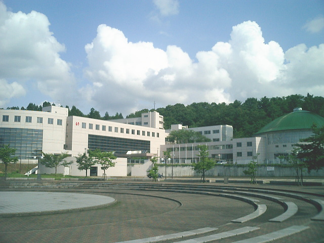 長岡大学